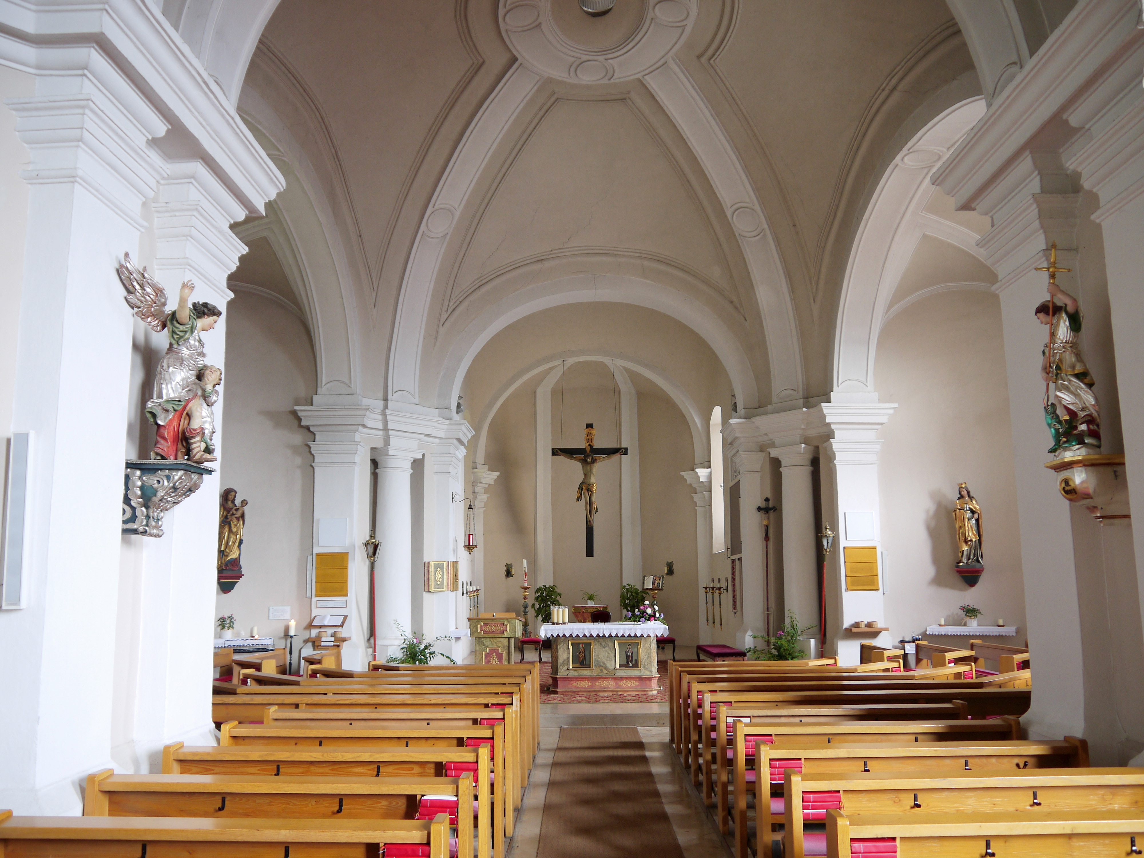 Kath. Pfarrkirche hl. Georg und ehem. Friedhofsfläche